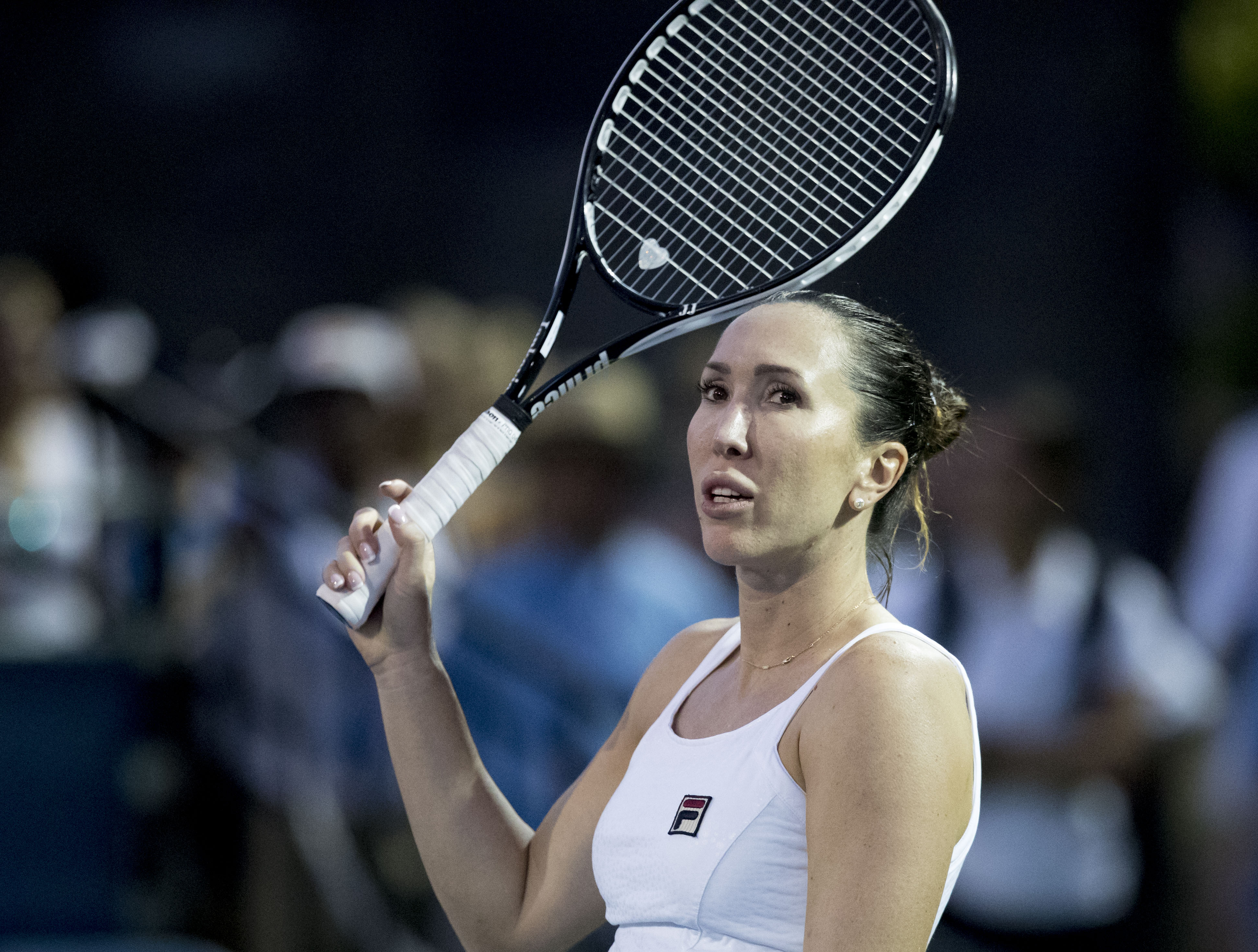 Citi Open Tennis 2017